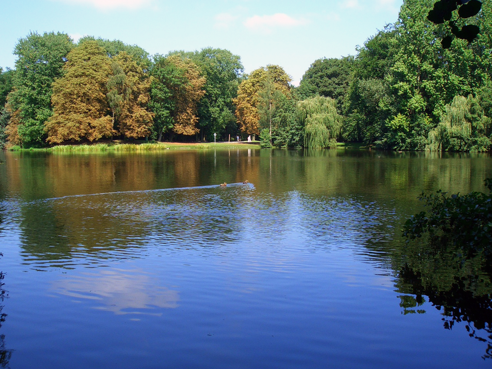 Северный Рейн - Вестфалия, Оберхаузен - парк Кайзергартен